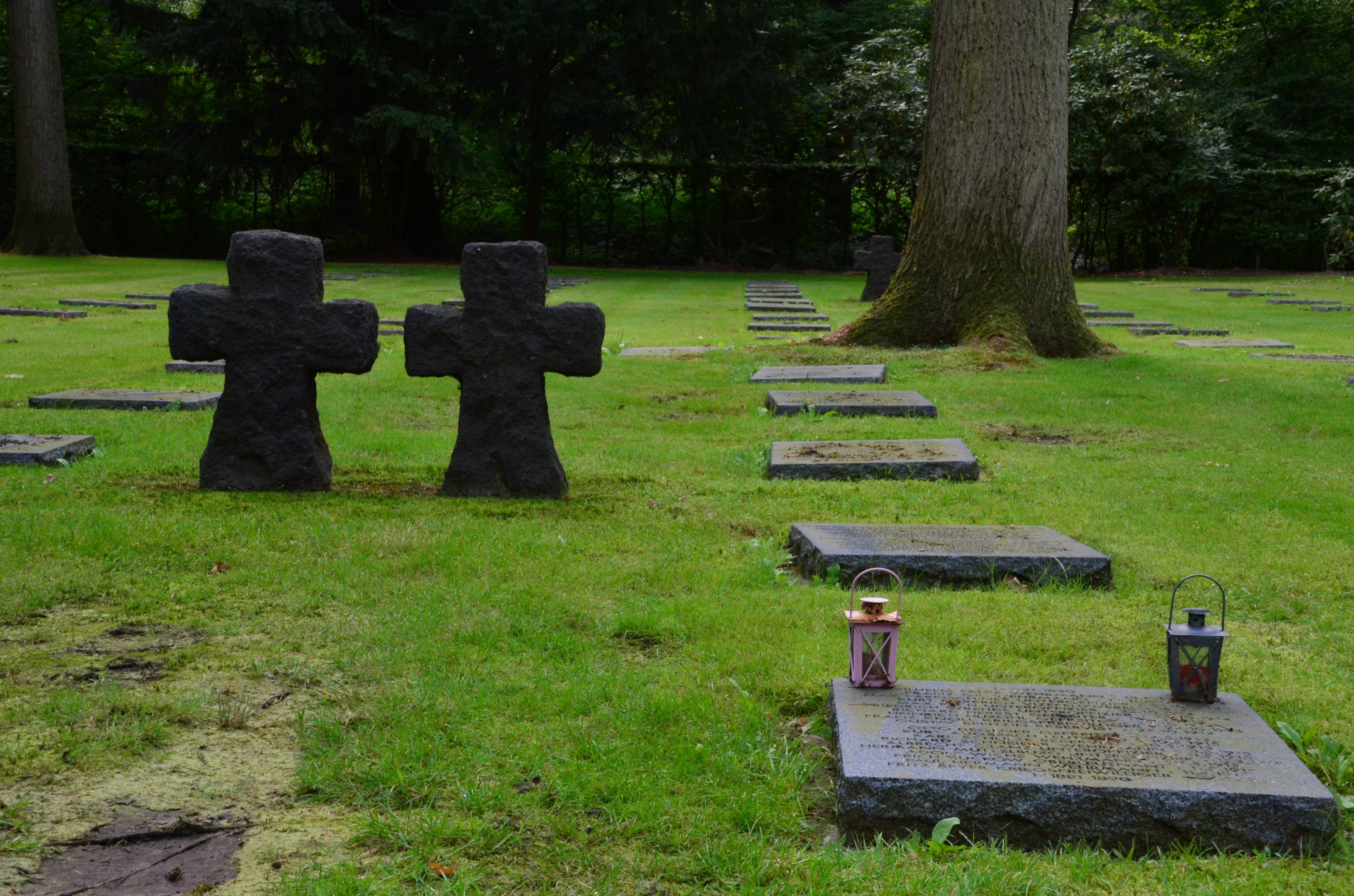 Deutscher Soldatenfriedhof in Vladslo, Westflandern, Belgien. Hier sind 25.645 deutsche Soldaten begraben, darunter auch Hanns Braun (1886–1918) und Peter Kollwitz (1896–1914). Die Begräbnisstätte ist bekannt für das dort aufgestellte bildhauerische Hauptwerk von Käthe Kollwitz, das Trauernde Elternpaar, das die Gesichtszüge des Ehepaares Kollwitz zeigt. Zuvor stand es ab 1932 auf dem deutschen Soldatenfriedhof Esen-Roggeveld, auf dem Peter Kollwitz ursprünglich beigesetzt worden war.